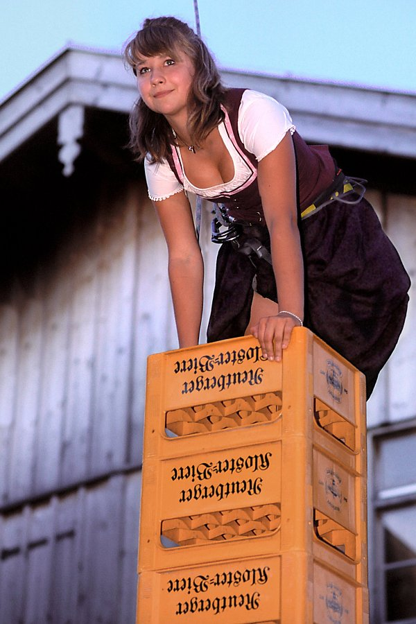 Bierkistenklettern